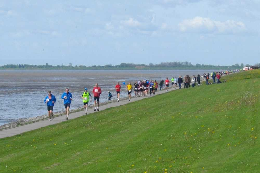 Gorch-Fock-Marathon 2010